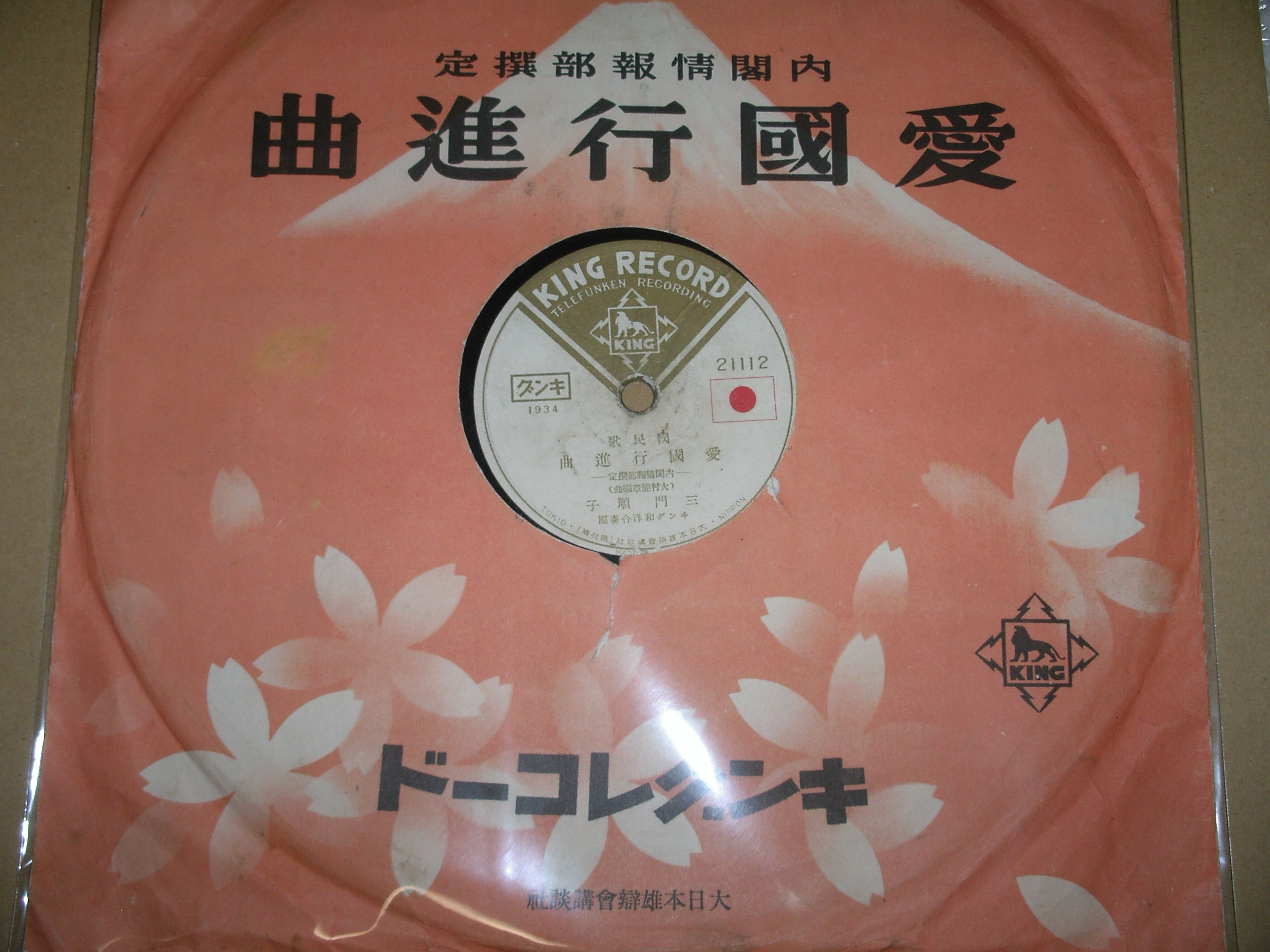 1938年キングレコード発売の愛国行進曲を撮影